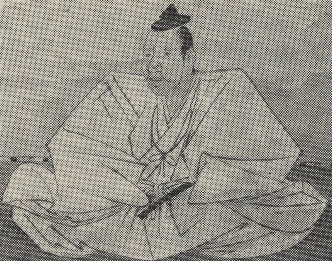 池田重利の肖像(モノクロ)。